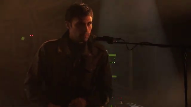 Romain Turzi sous le nom de Turzi le 21 janvier 2017 à Paris, à la Maroquinerie, lors d'une soirée Gonzaï.